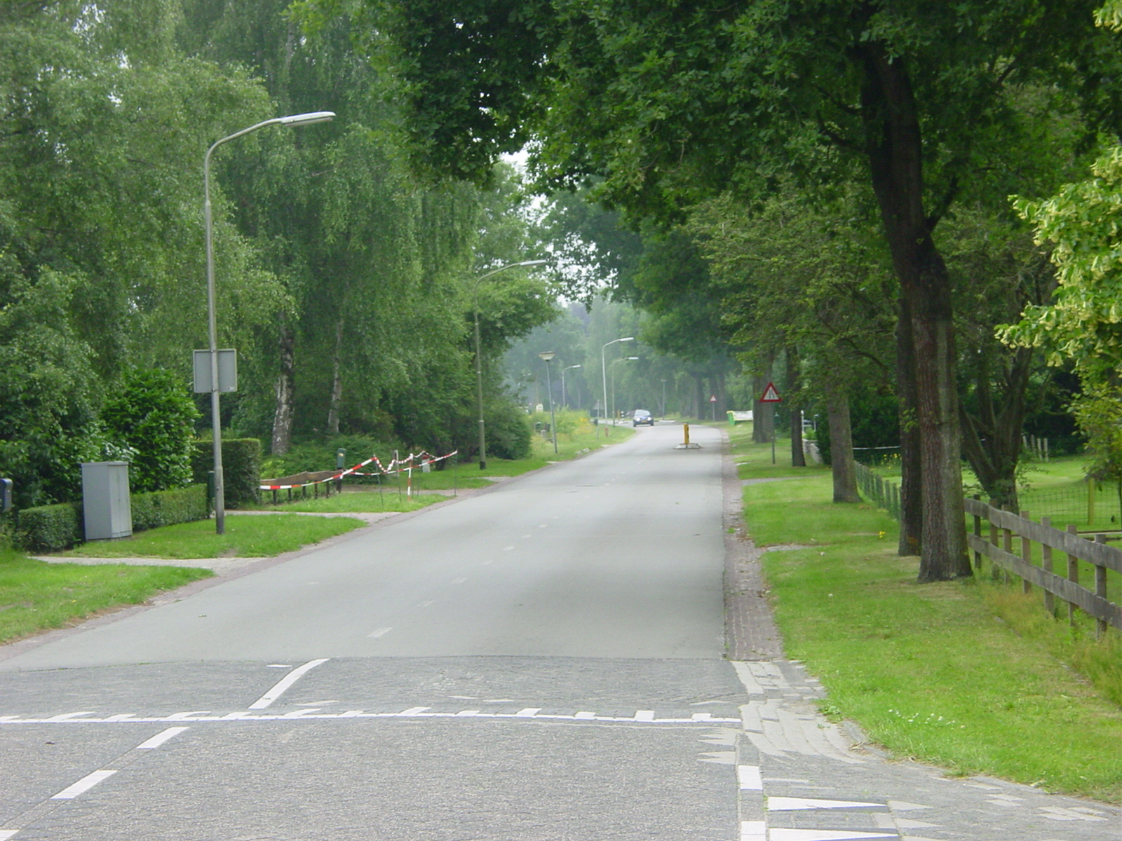 't Haantje in The Netherlands